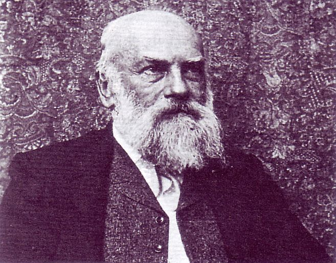 Dr. Heinrich Gerber, 1832 - 1912 - Pionier des Brückenbaus in Deutschland